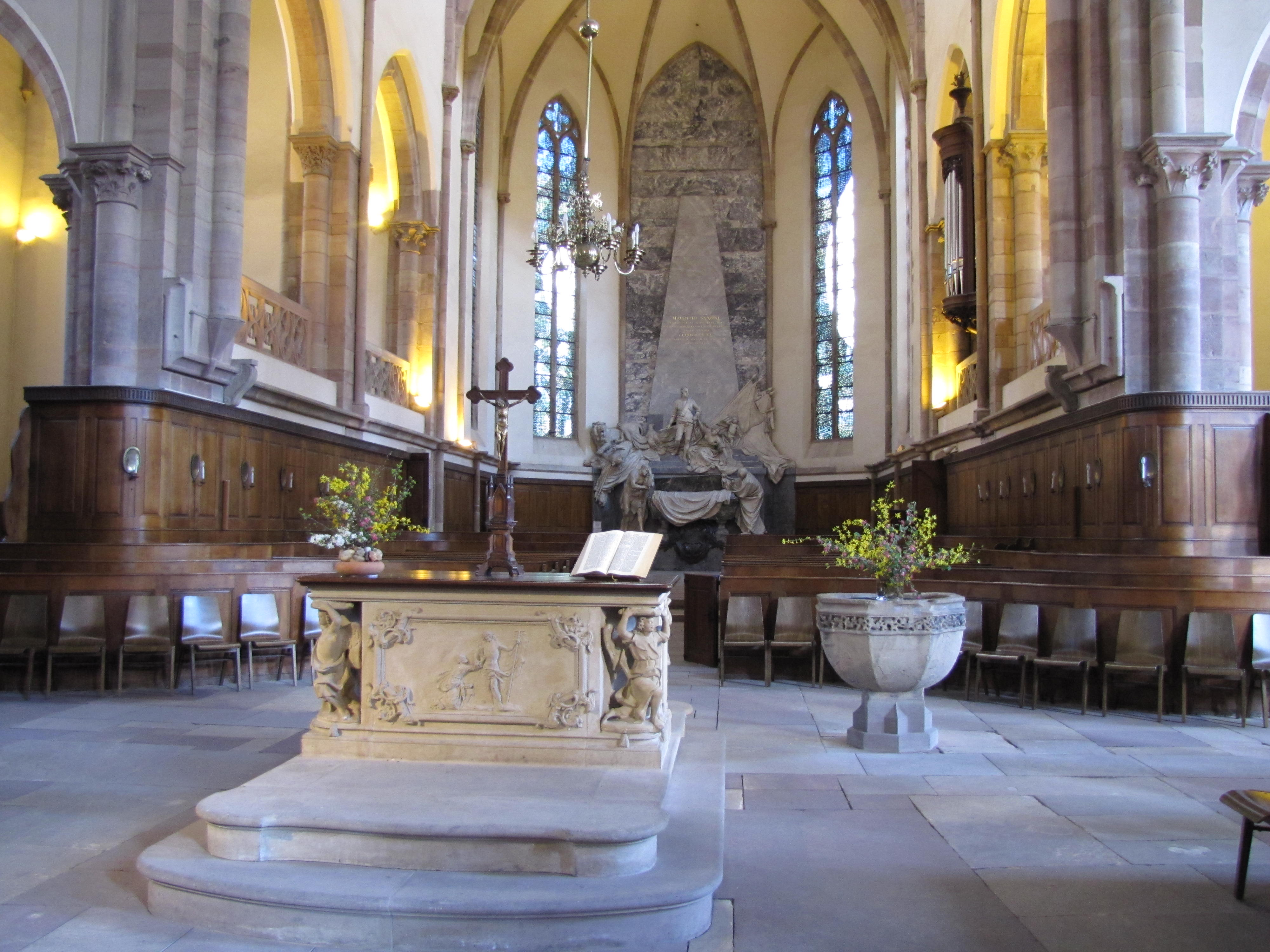 Alsace, Bas-Rhin, Église protestante Saint-Thomas de Strasbourg, 4 rue Martin-Luther (PA00085032).Autel protestant (1744)